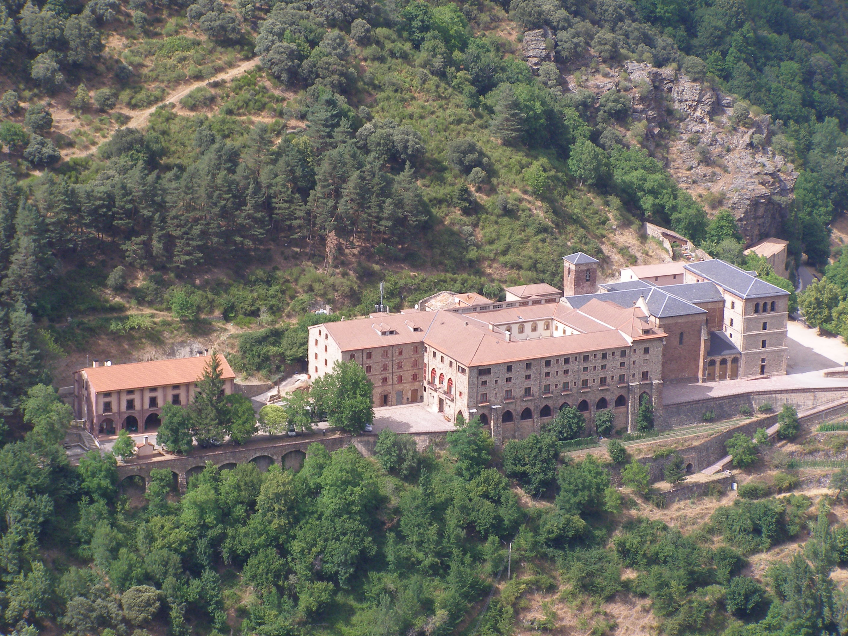 Panorámica del Monasterio-Abadía-Santuario de Valvanera tomada desde el lado suroeste. El techo azul es la iglesia, se aprecia el claustro monacal y un apéndice saliente que es la hospedería monástica al que pertenece también un pequeño edificio separado con servicios y facilidades para huéspedes y peregrinos.